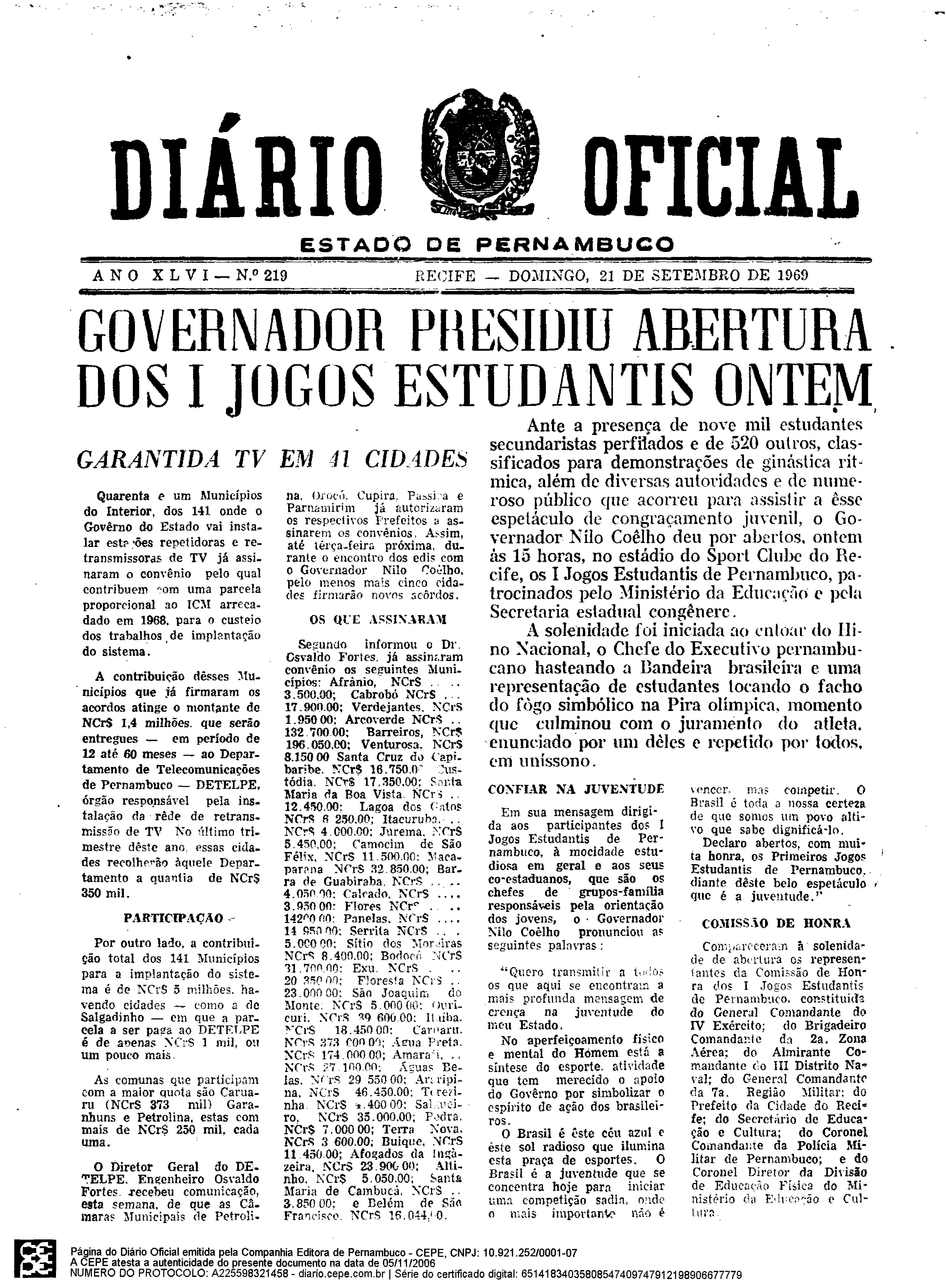 I Jogos Escolares de Pernambuco